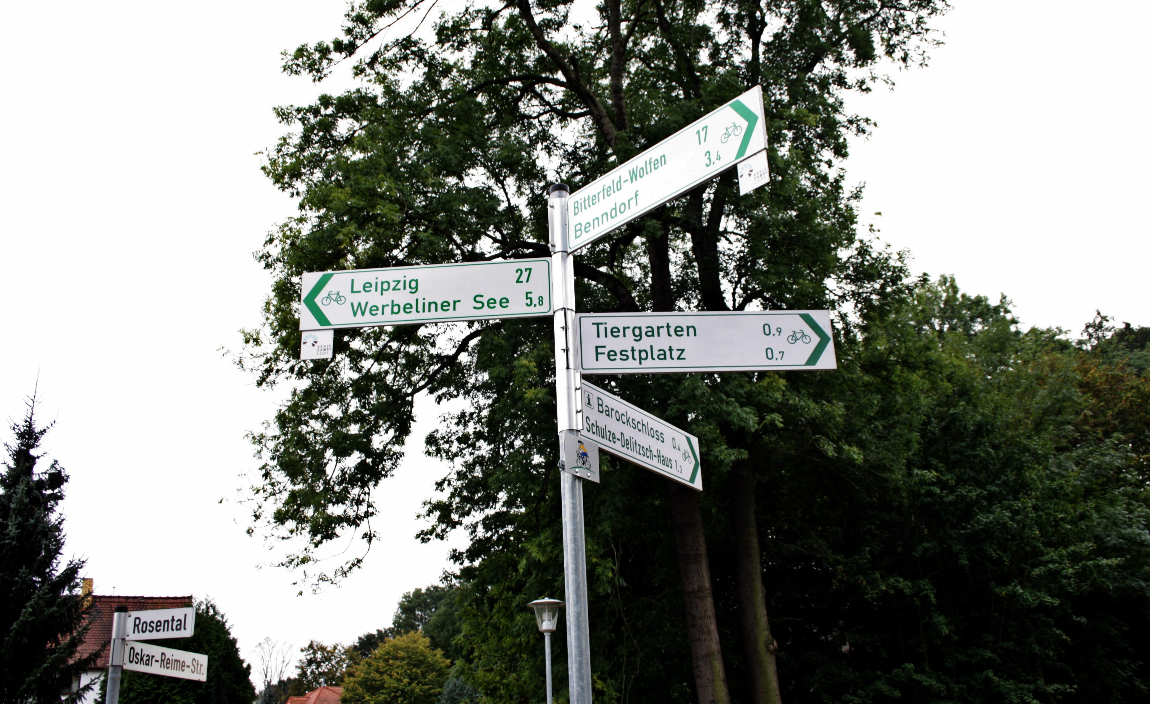 Hinweistafel des Delitzscher Radwegnetzes